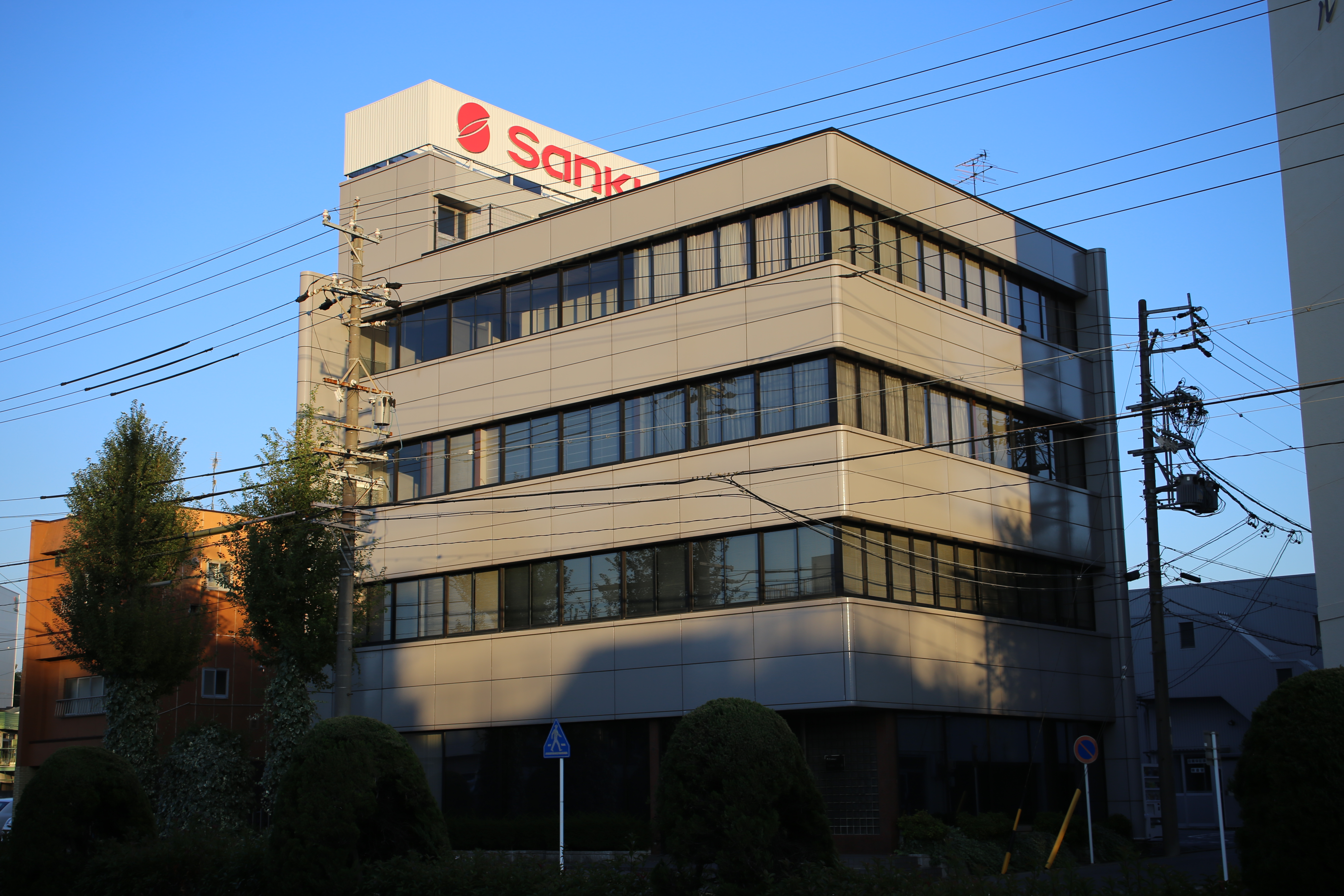 名古屋市熱田区白鳥二丁目の三機本社を北側公道西側より撮影